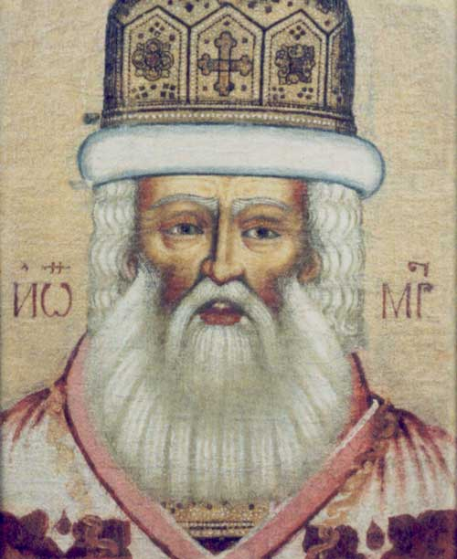 Неизвестный художник Портрет ростовского митрополита Ионы Сысоевича. Конец XVII (?) -первая половина XVIII в. Холст, масло. 50х41. Ж-552 Пост. 1920. из собрания А.А. Титова/ Ростовский кремль